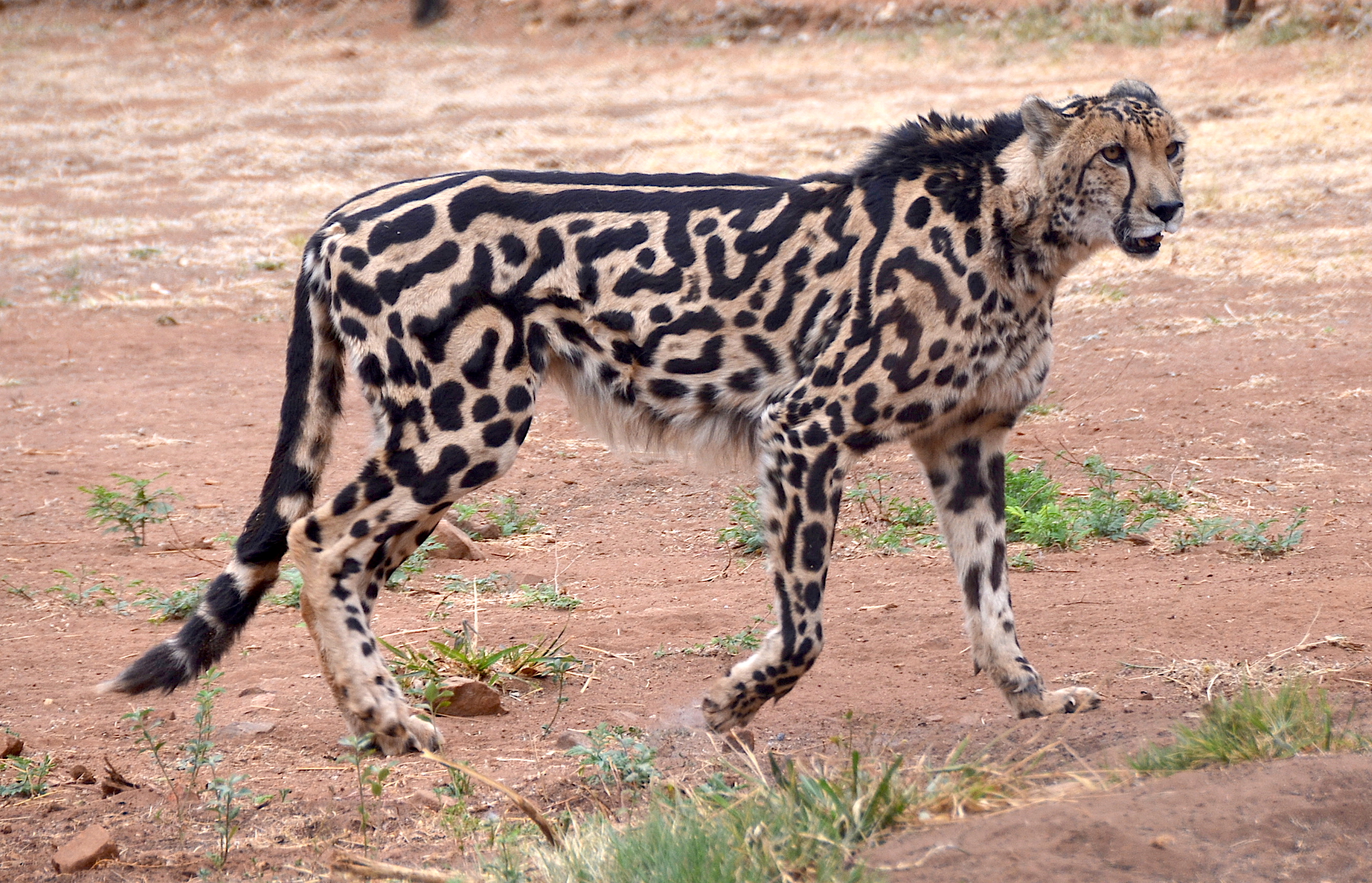 Königsgepard im De Wildt Cheetah Research Centre (Südafrika)